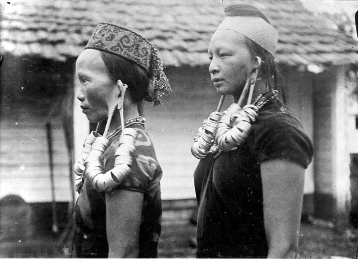 Repronegatief. Dajak vrouwen met veel oorringen, Borneo